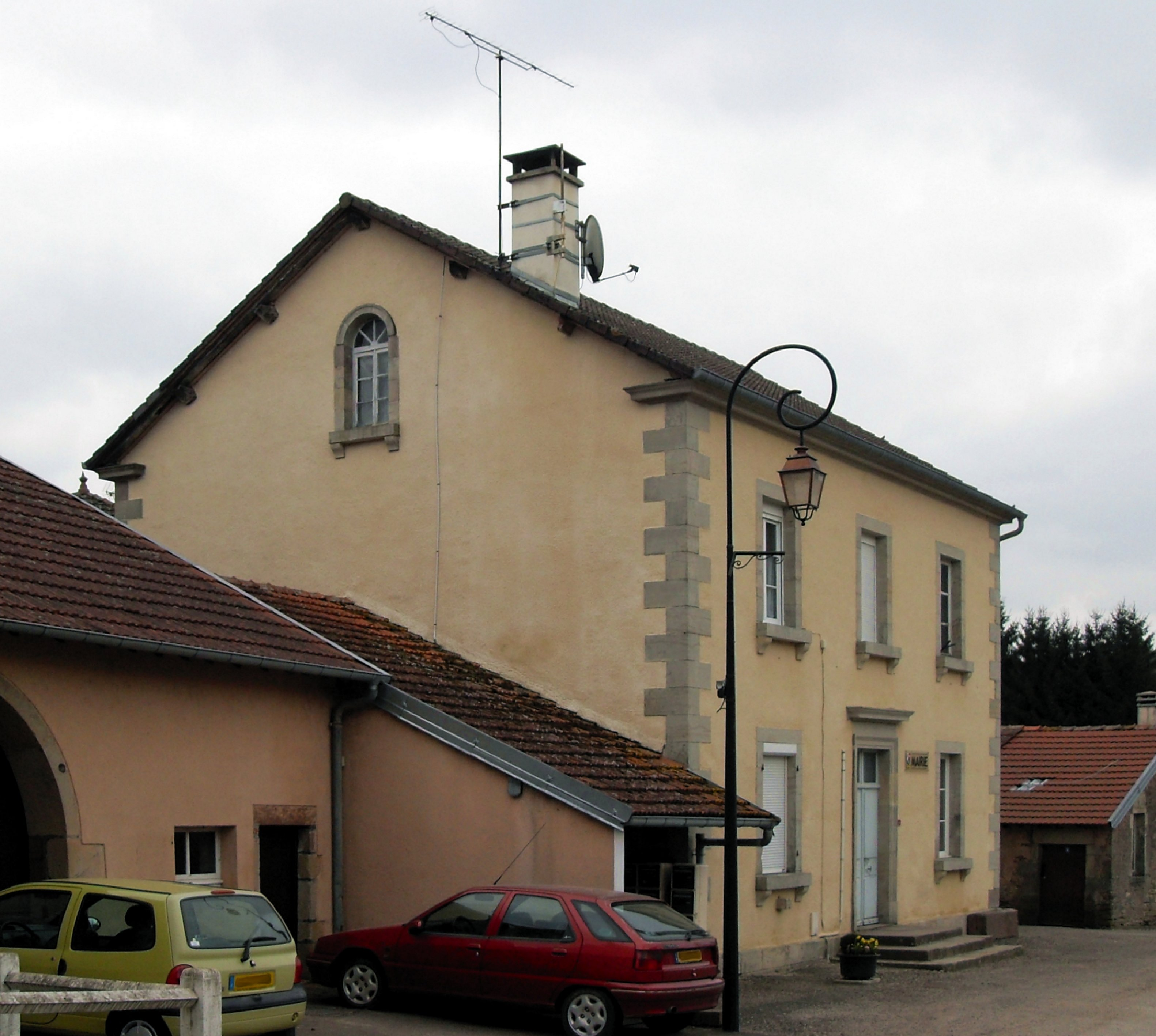 L'église Saint-Étienne à Dampvalley-Saint-Pancras